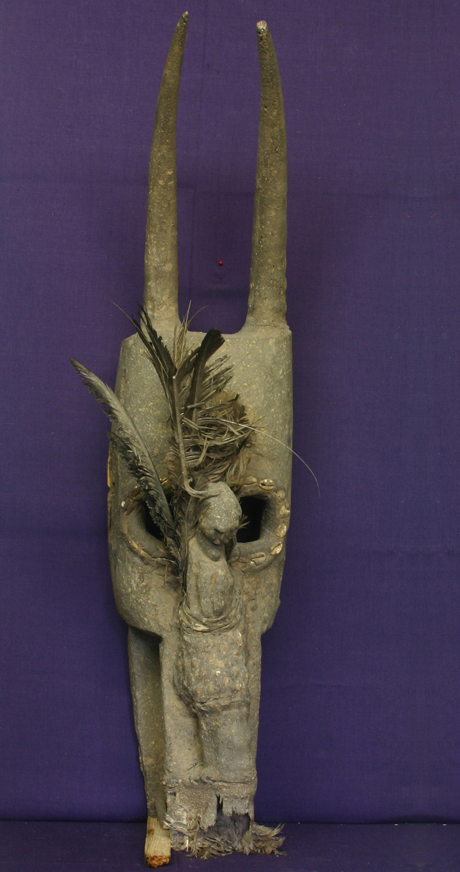 Sehr schlecht erhaltene Antilopenmaske aus der Sammlung des Capitaine Baud. In der Inventarliste mit ungenauem Ursprung aufgeführt. about 1900